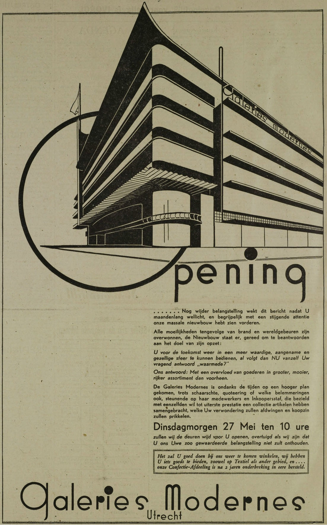 Warenhuis Galeries Modernes te Utrecht, krantenadvertentie mbt de heropening in 1941 in een nieuw pand (ontwerp van het gebouw uit 1938 door de architect Dirk (Dick) Brouwer)